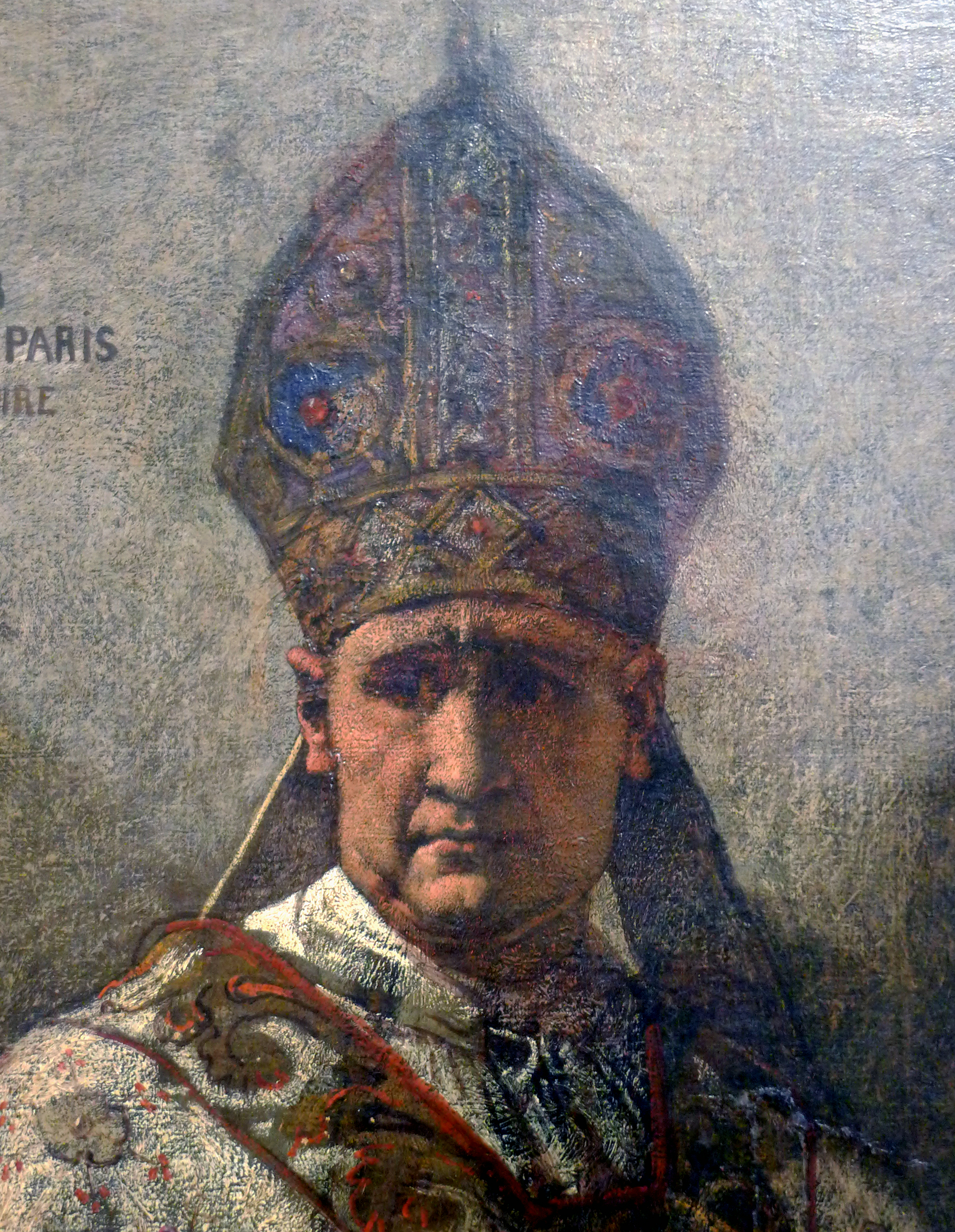 detail